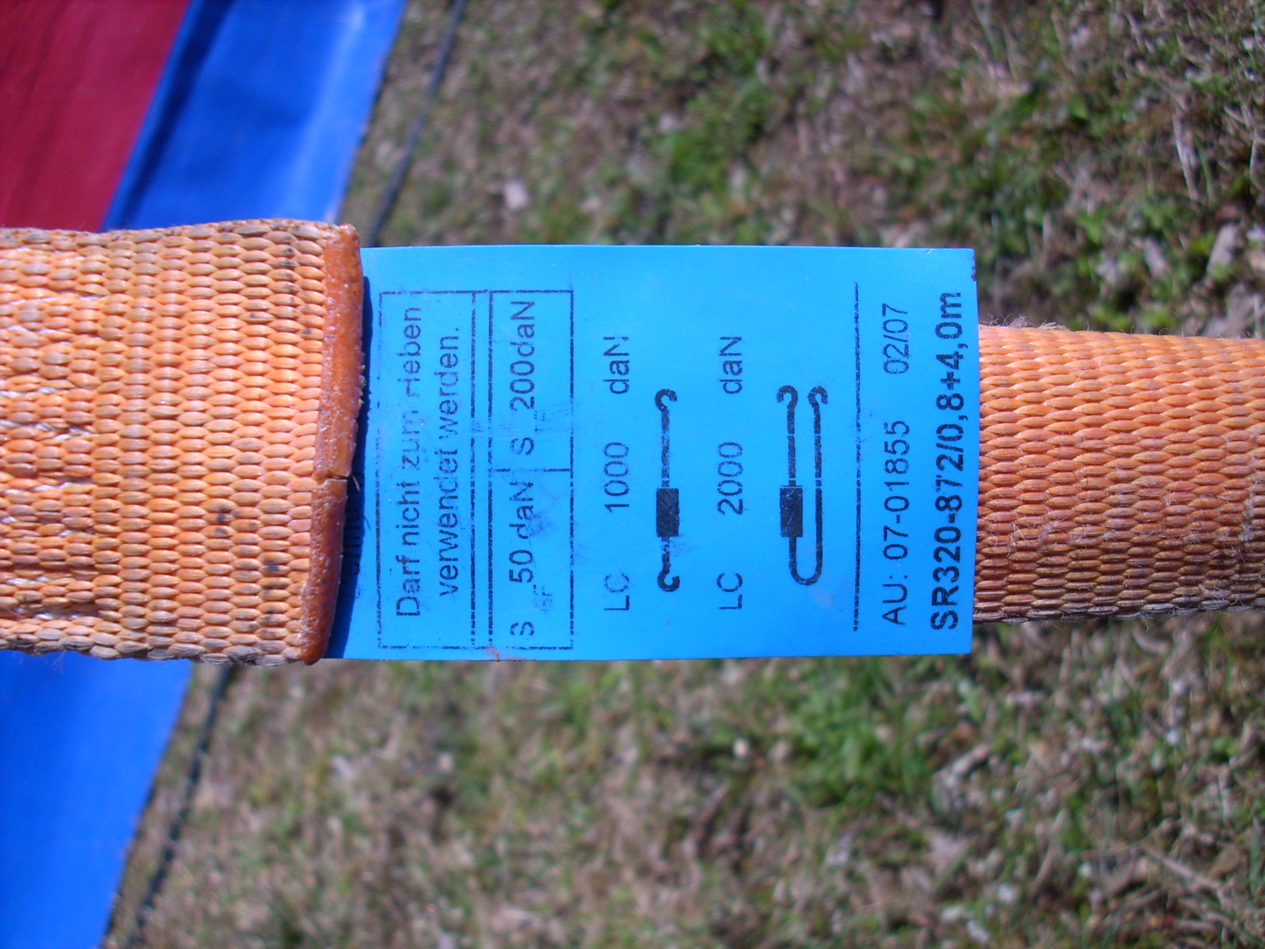 Spanngurt mit blauem Prüfschild